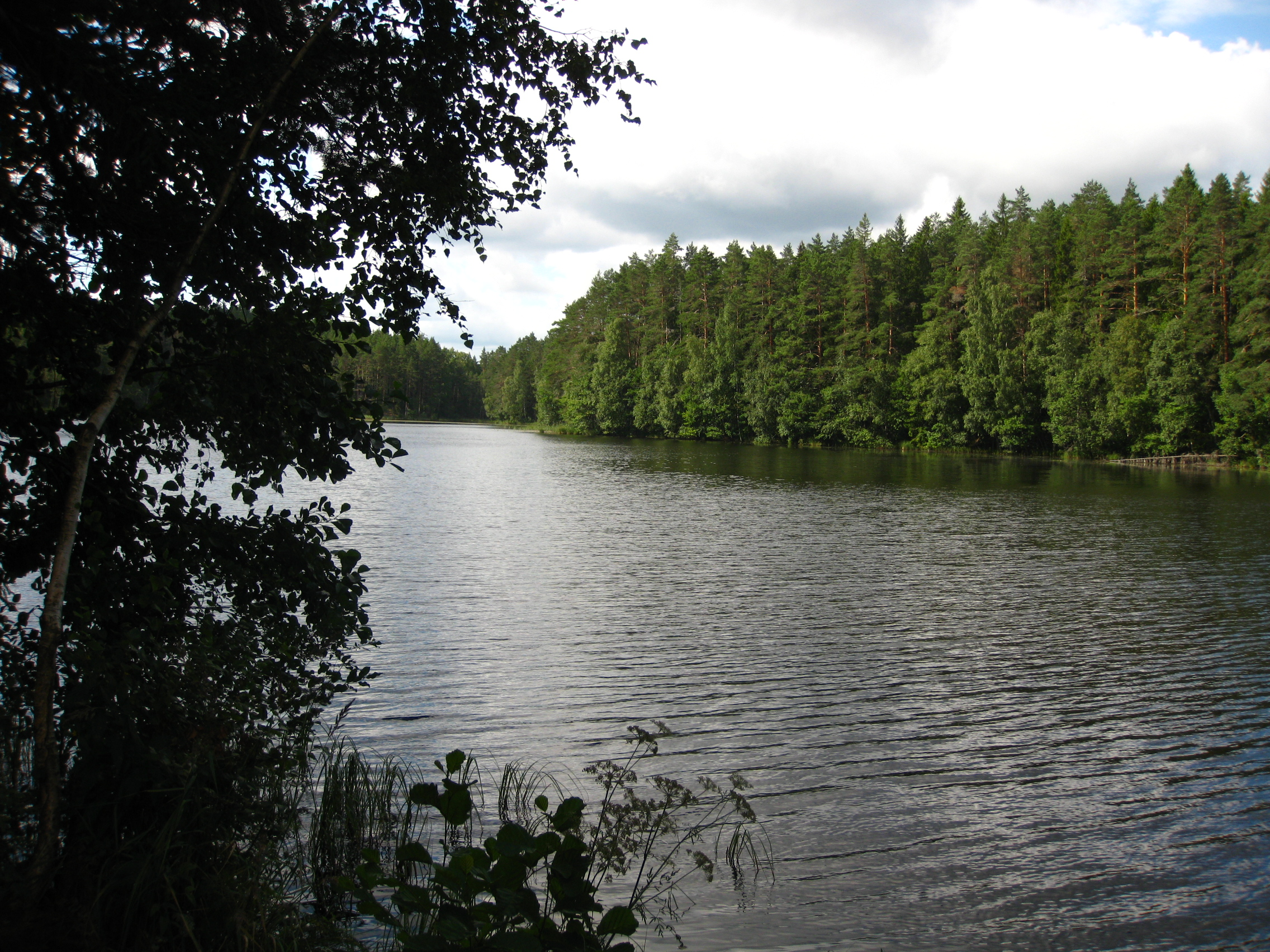 Järvi Pikkjärve põhjakaldal